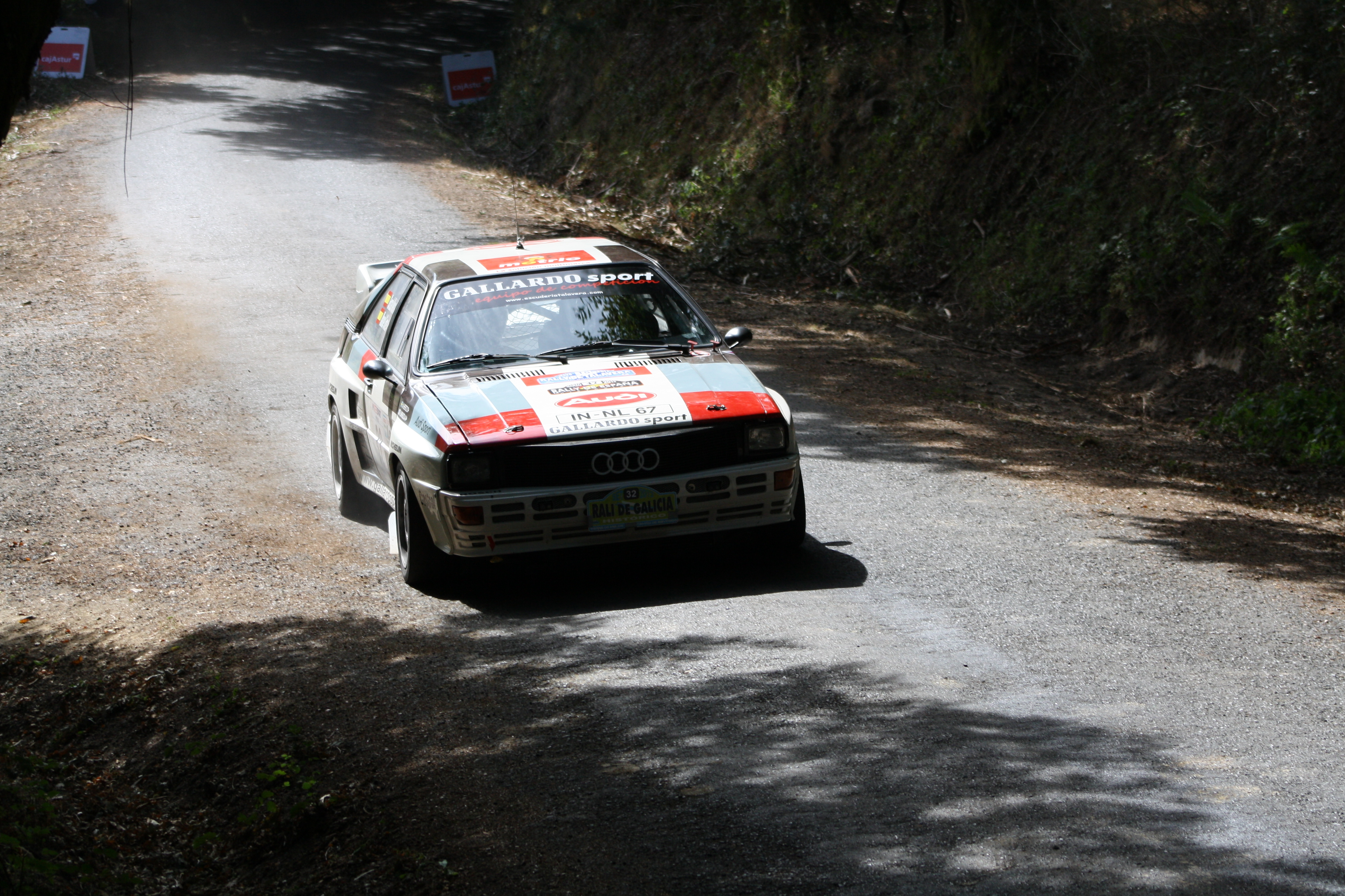 Audi Quattro en el Rally de Galicia Histórico de 2012.